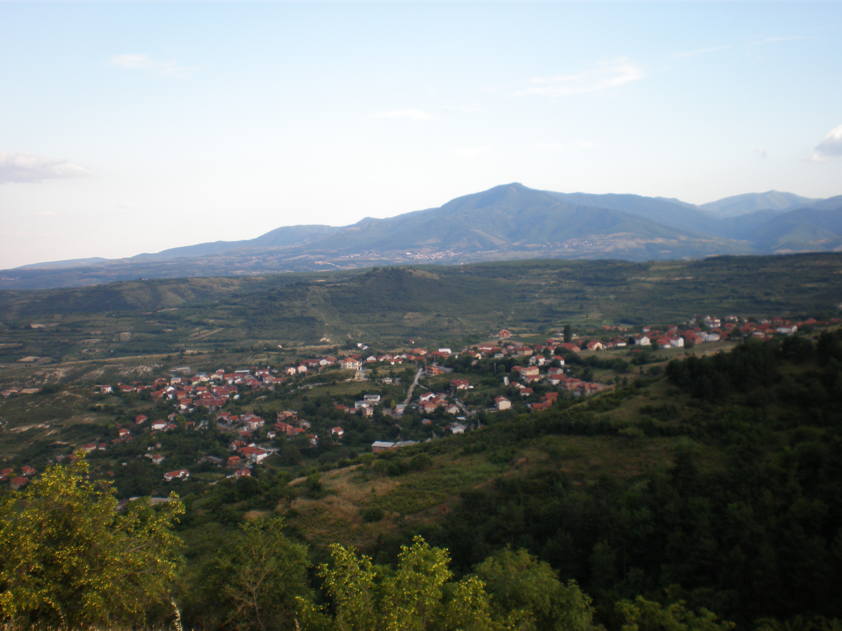 Поглед на село Сопиште од месноста Марково Крувче на Водно